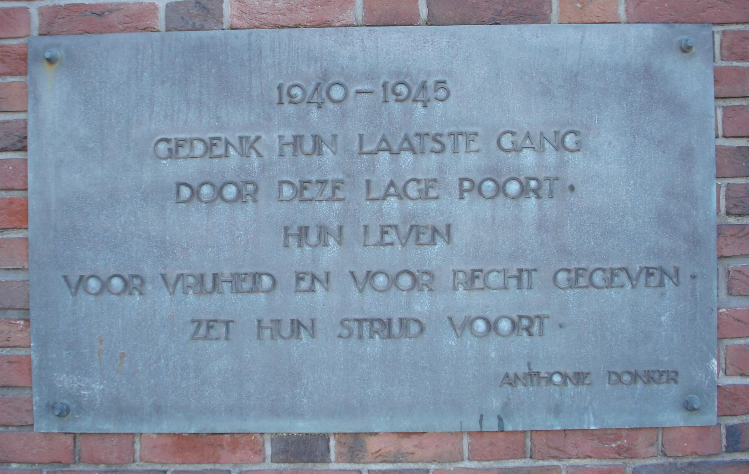 Scheveningen, Van Alkemadelaan. Plaquette "Hun laatste gang". Geschreven door Anthonie Donker (=Nico Donkersloot) The Hague/The Netherlands.